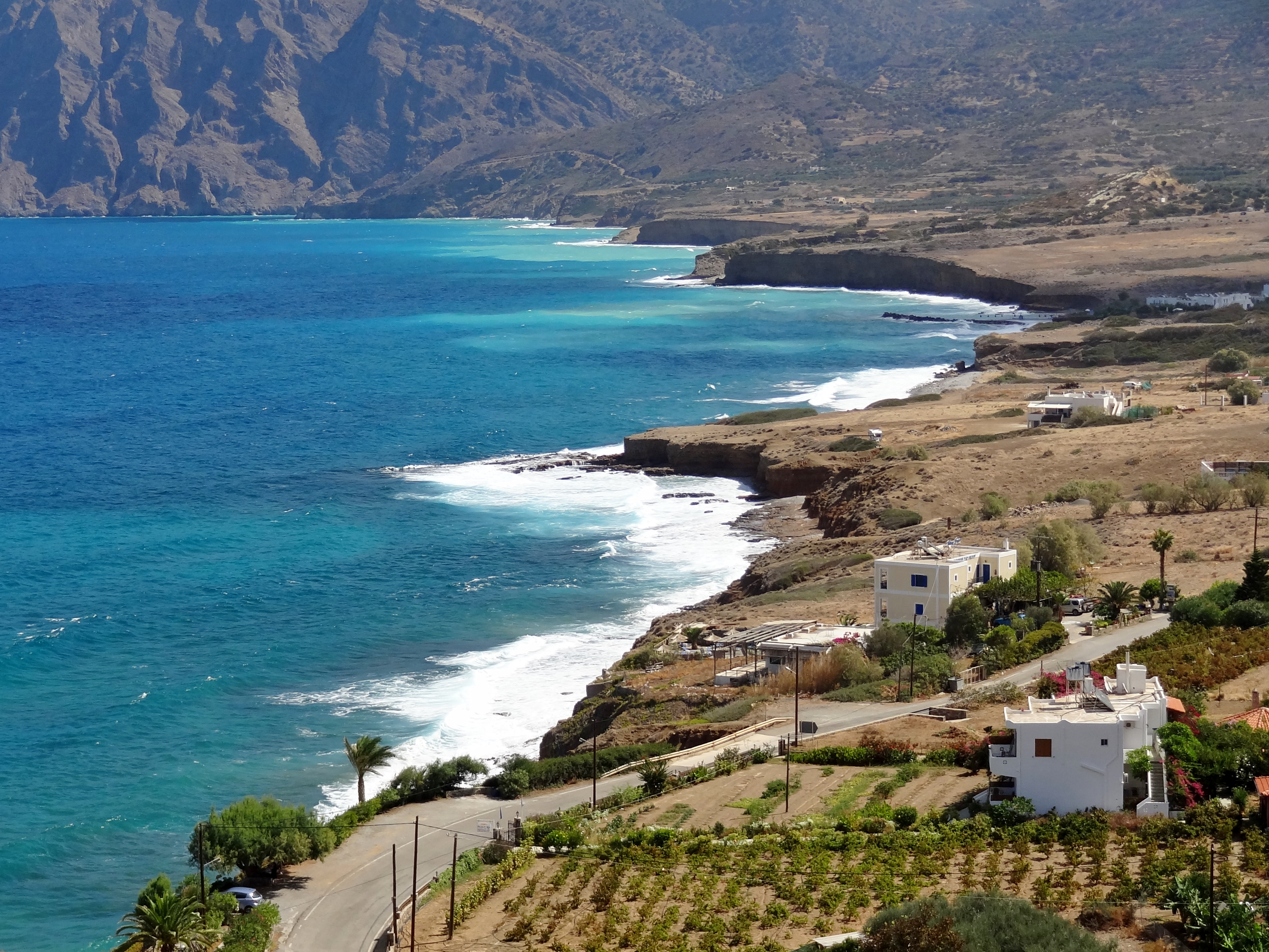 Bucht von Mochlos (Όρμος Μόχλου), Kreta, Griechenland